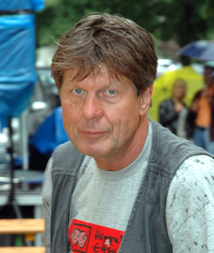 Wolfgang Ettlich bei einem Strassenfest vor dem Heppel & Ettlich der Römerstrasse, München 2008